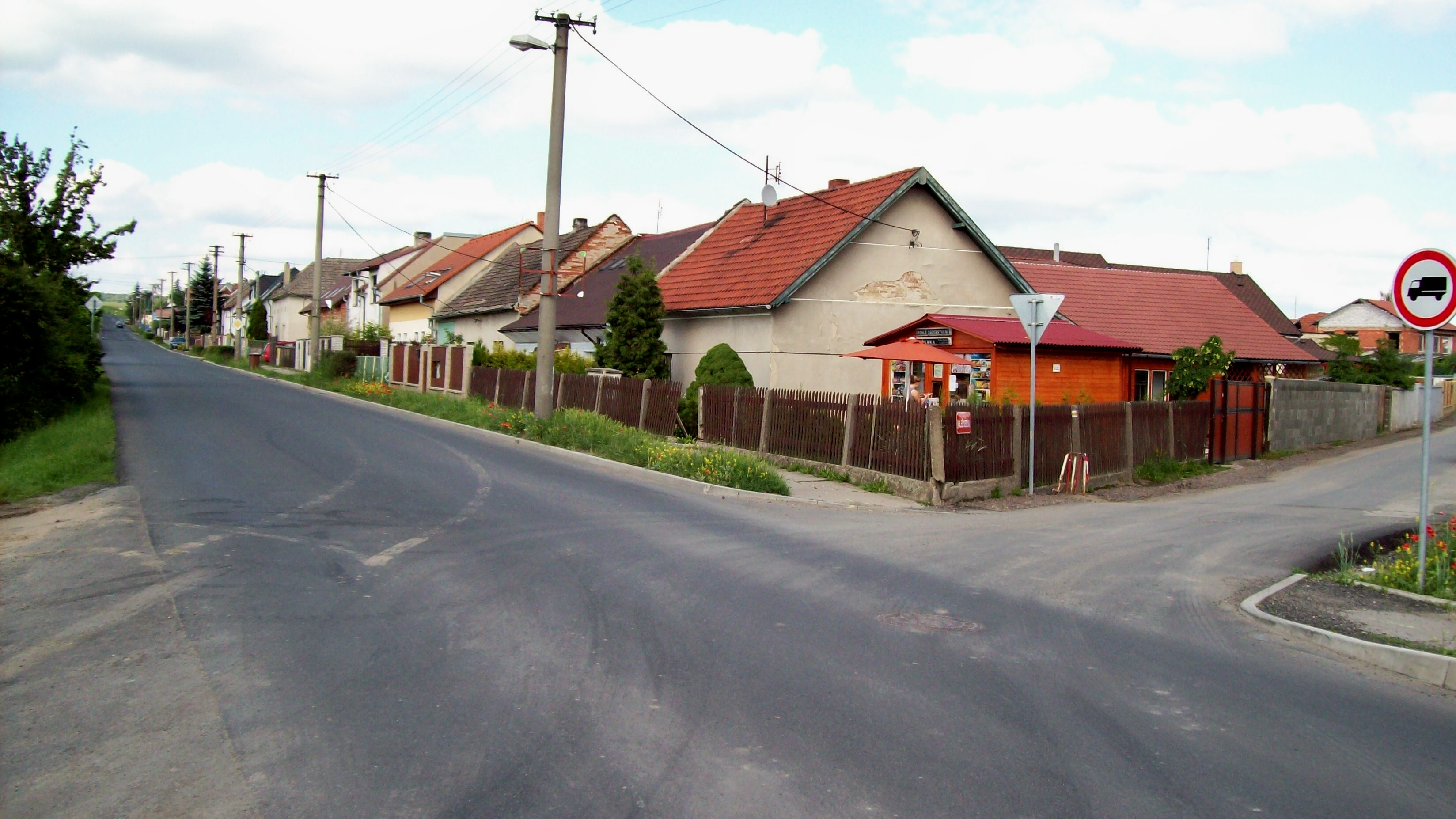 Kokořínská ulice na Blatech, Mělník. Pohled od Mělníka ke Chloumku. Vpravo vedlejší Hleďsebská ulice.